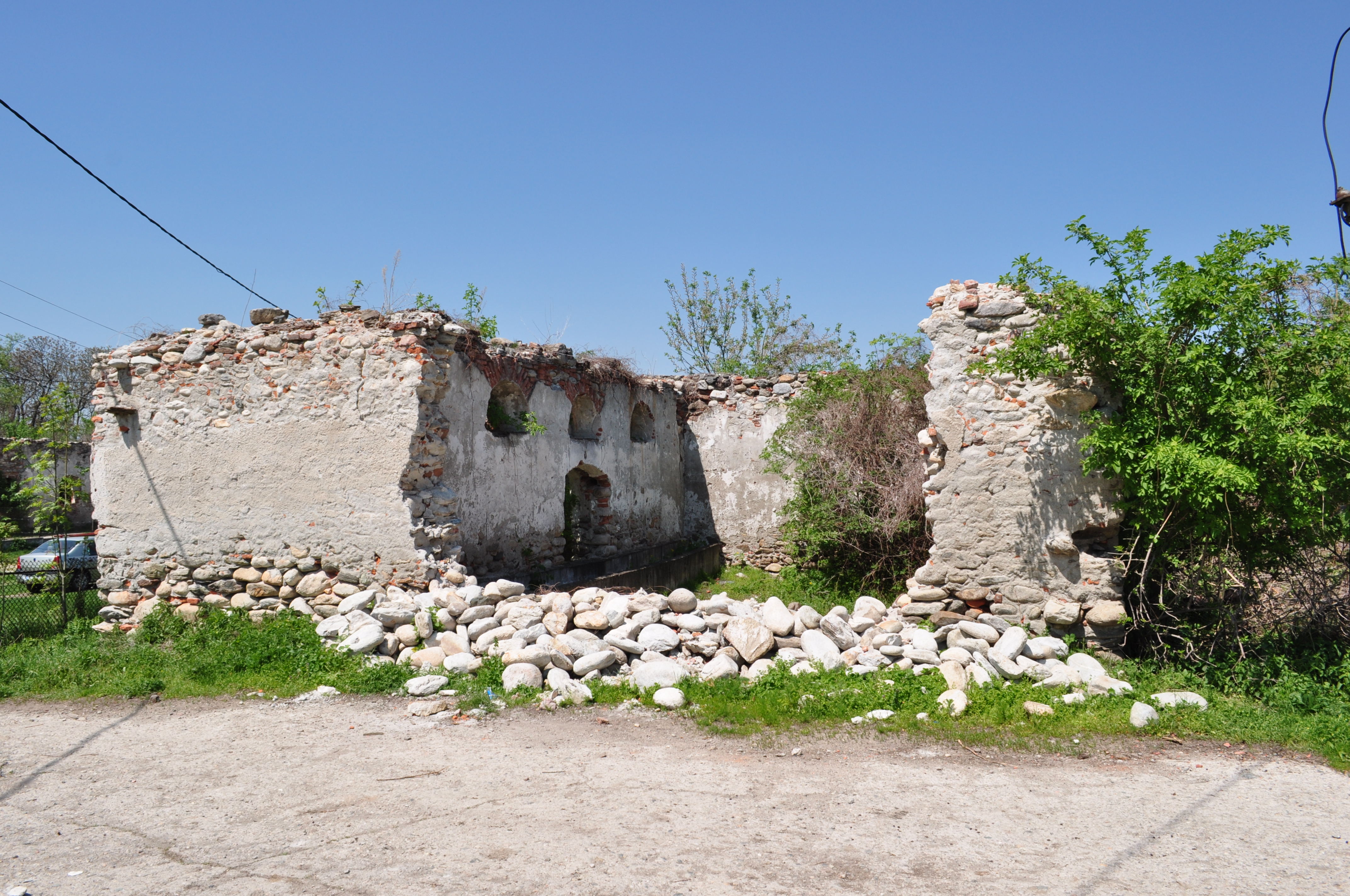 Curtea nobiliară a Cândeştilor, sat RÂU DE MORI; comuna RÂU DE MORI